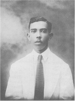 Portrait de l'écrivain haïtien Philippe Thoby-Marcelin.